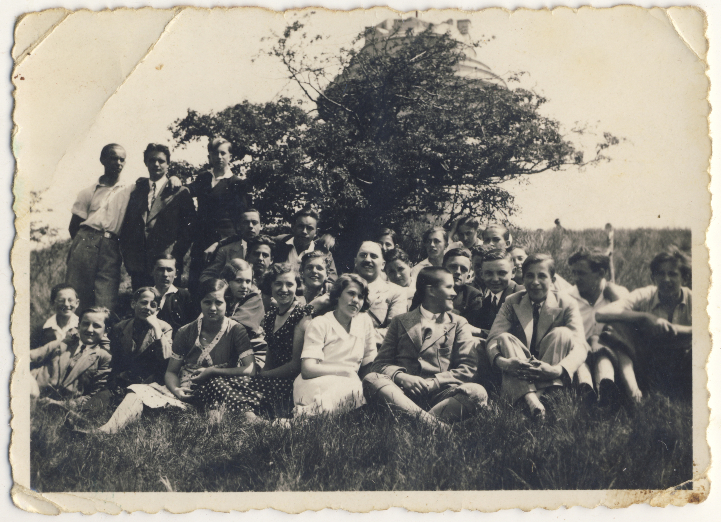 Kirándulás a Zobor tetejére, a két világháború között